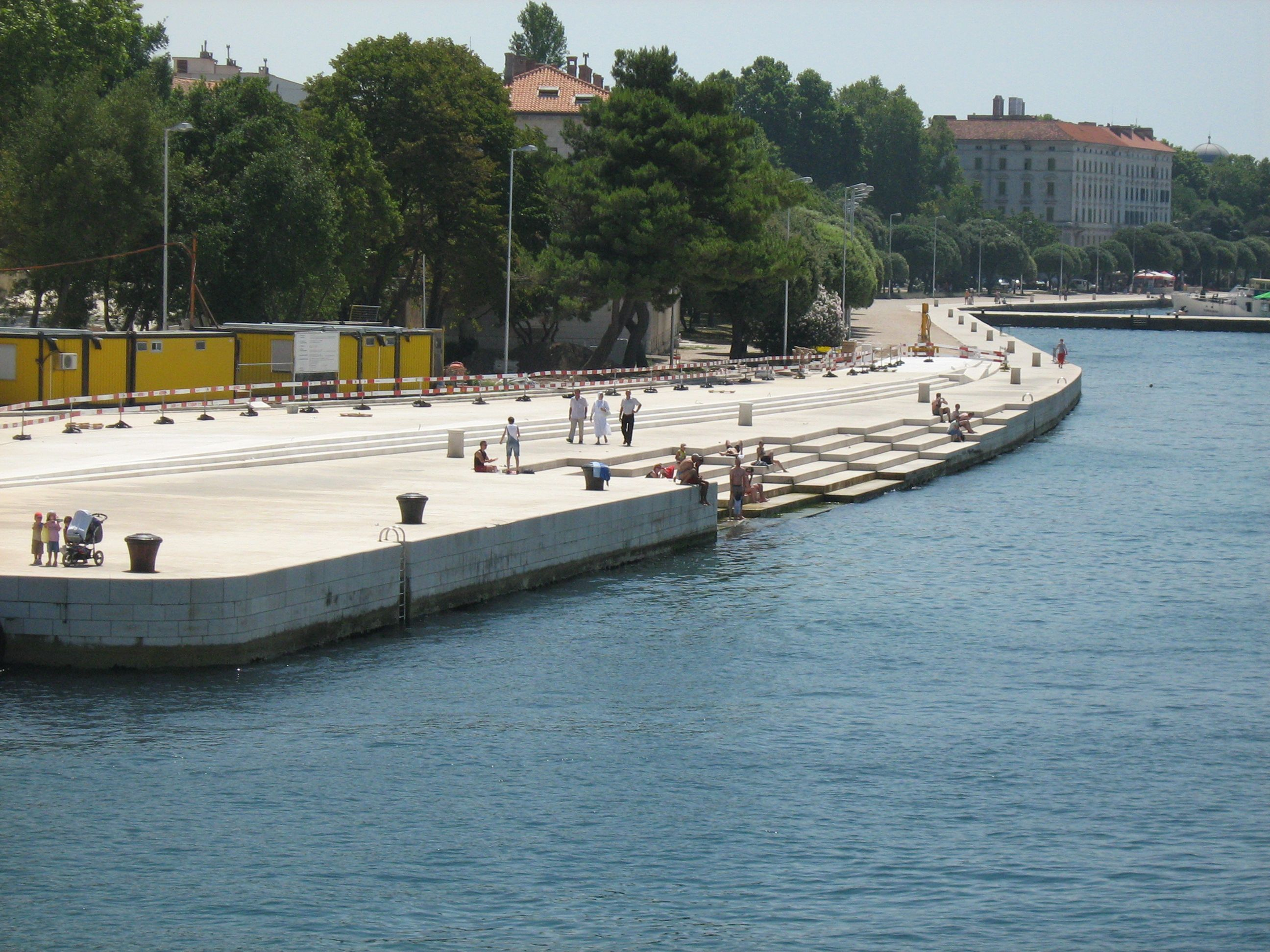 Sea organ in Zadar, Croatia